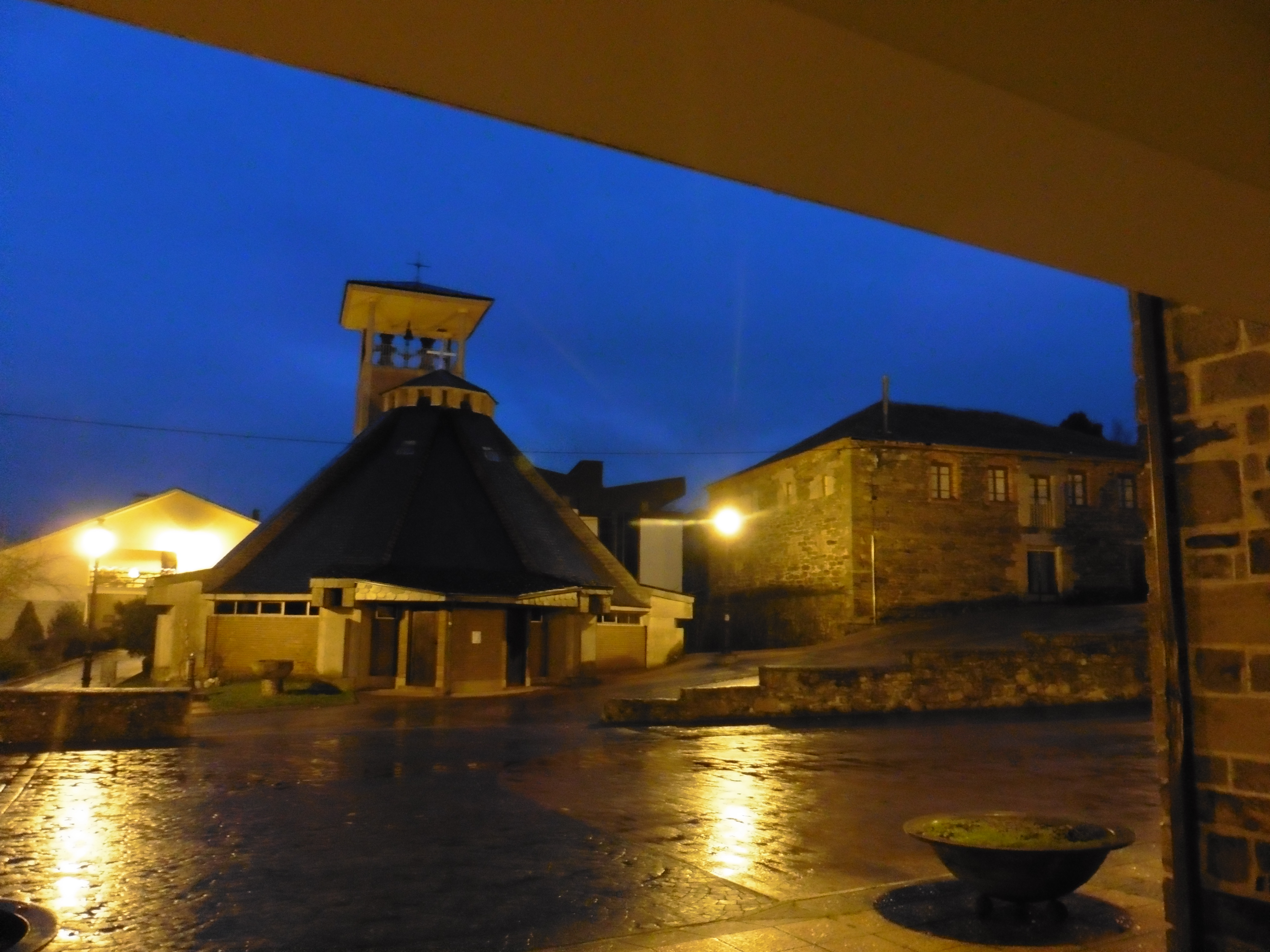 Plaza del ayuntamiento, desde el portal del mismo, con la iglesia, la casa del médico y la casa del cura